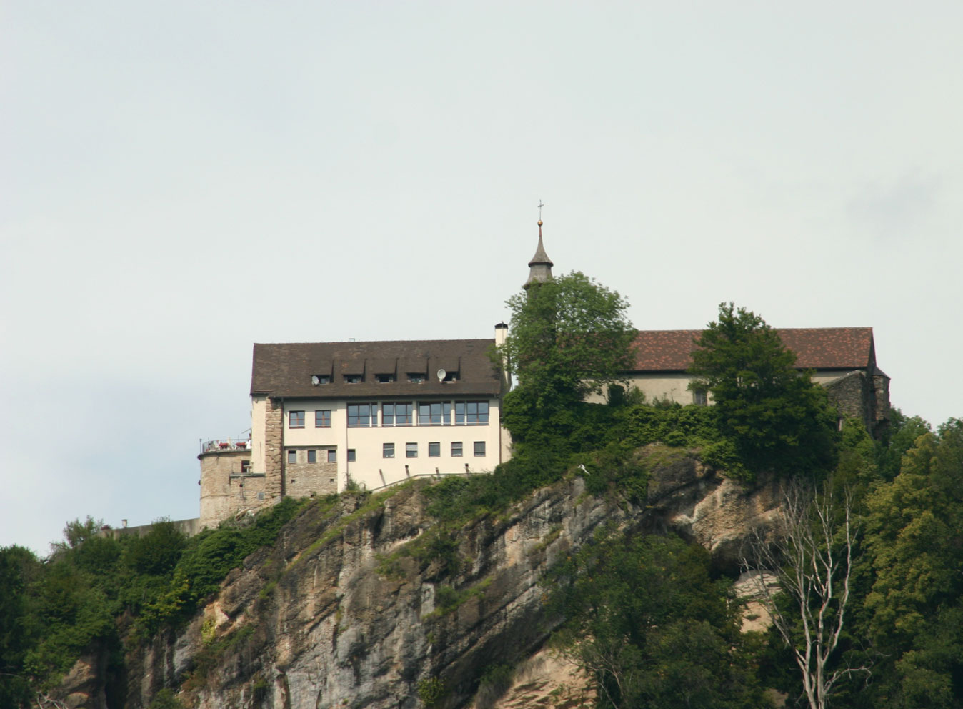 Gebhardsberg (bei Bregenz)